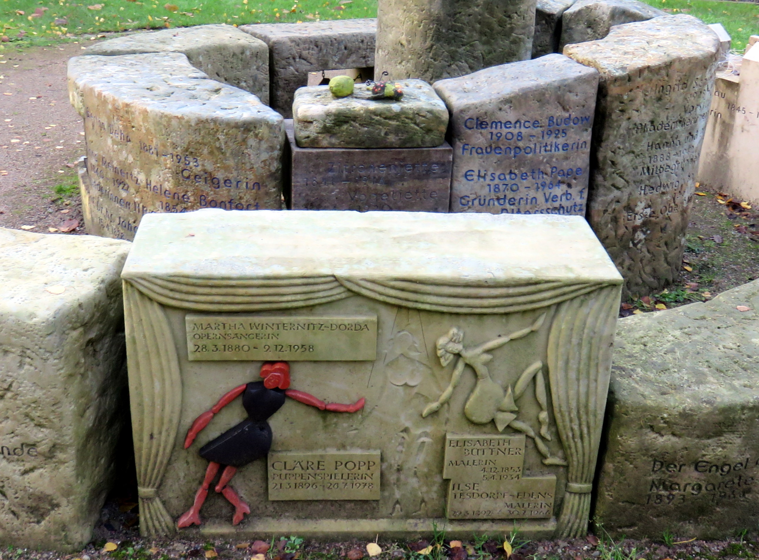 Gedenkstein für die Sopranistin und Gesangspädagogin Martha Winternitz-Dorda in der Erinnerungsspirale im Bereich des Gartens der Frauen auf dem Ohlsdorfer Friedhof in Hamburg-Ohlsdorf, zusammen mit der bildenden Künstlerin Cläre Popp und den Malerinnen Elisabeth Büttner und Ilse Tesdorpf-Edens.